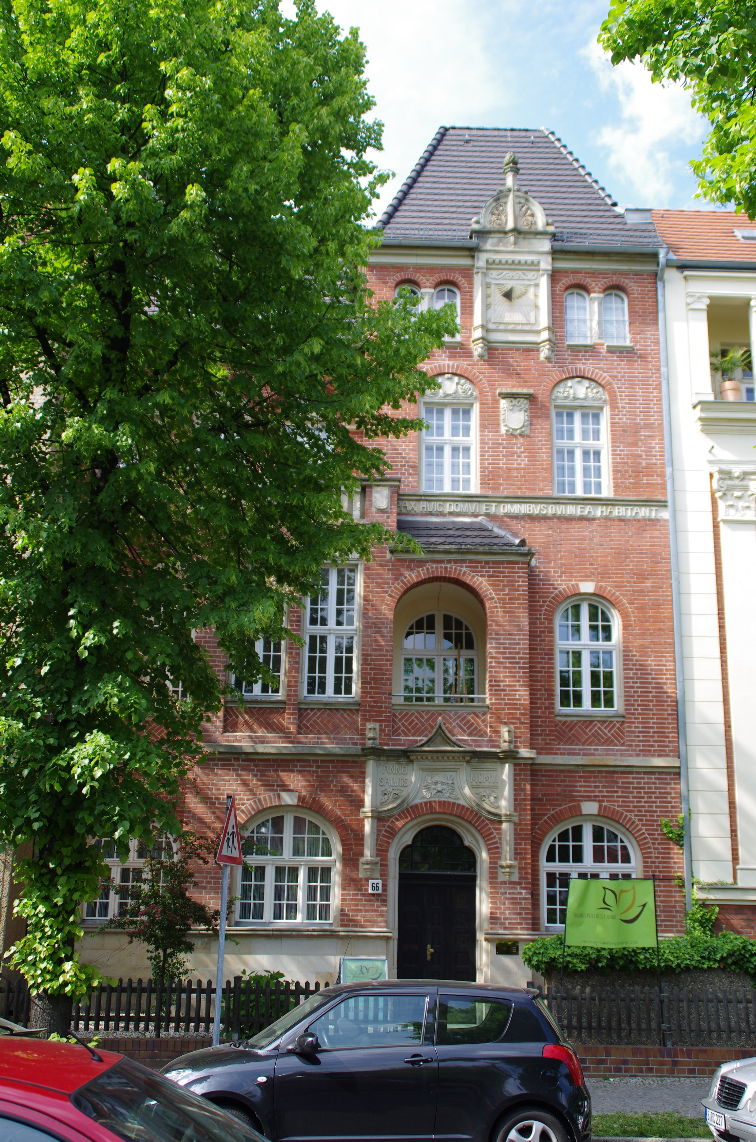 Potsdam in Brandenburg. Das Haus Gutenberg 66 wurde als Wohn- und Atelierhaus des Architekten Julius Otto Kerwien errichtet und steht unter Denkmalschutz.